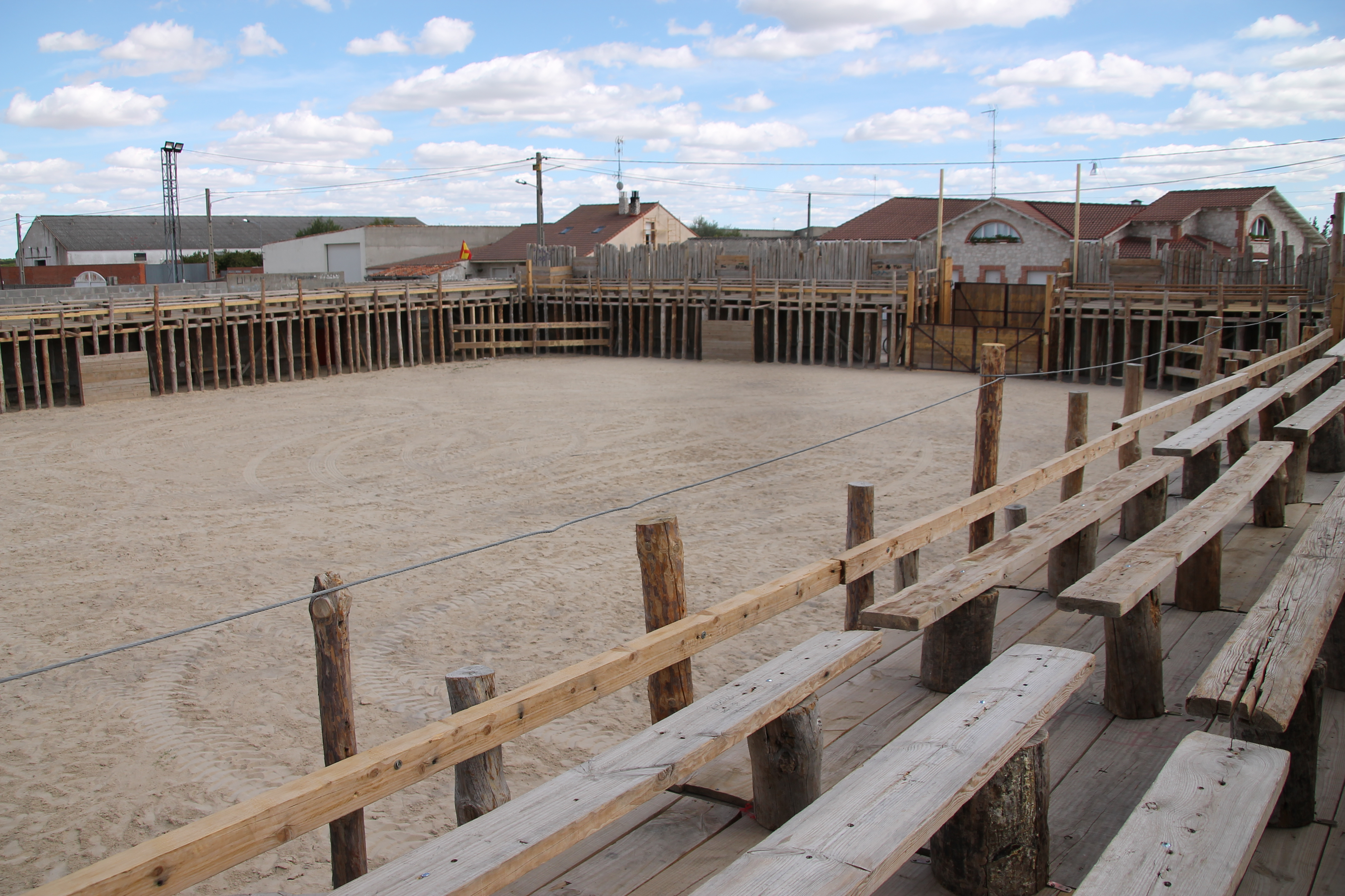 Plaza de Palos de Montemayor de Pililla